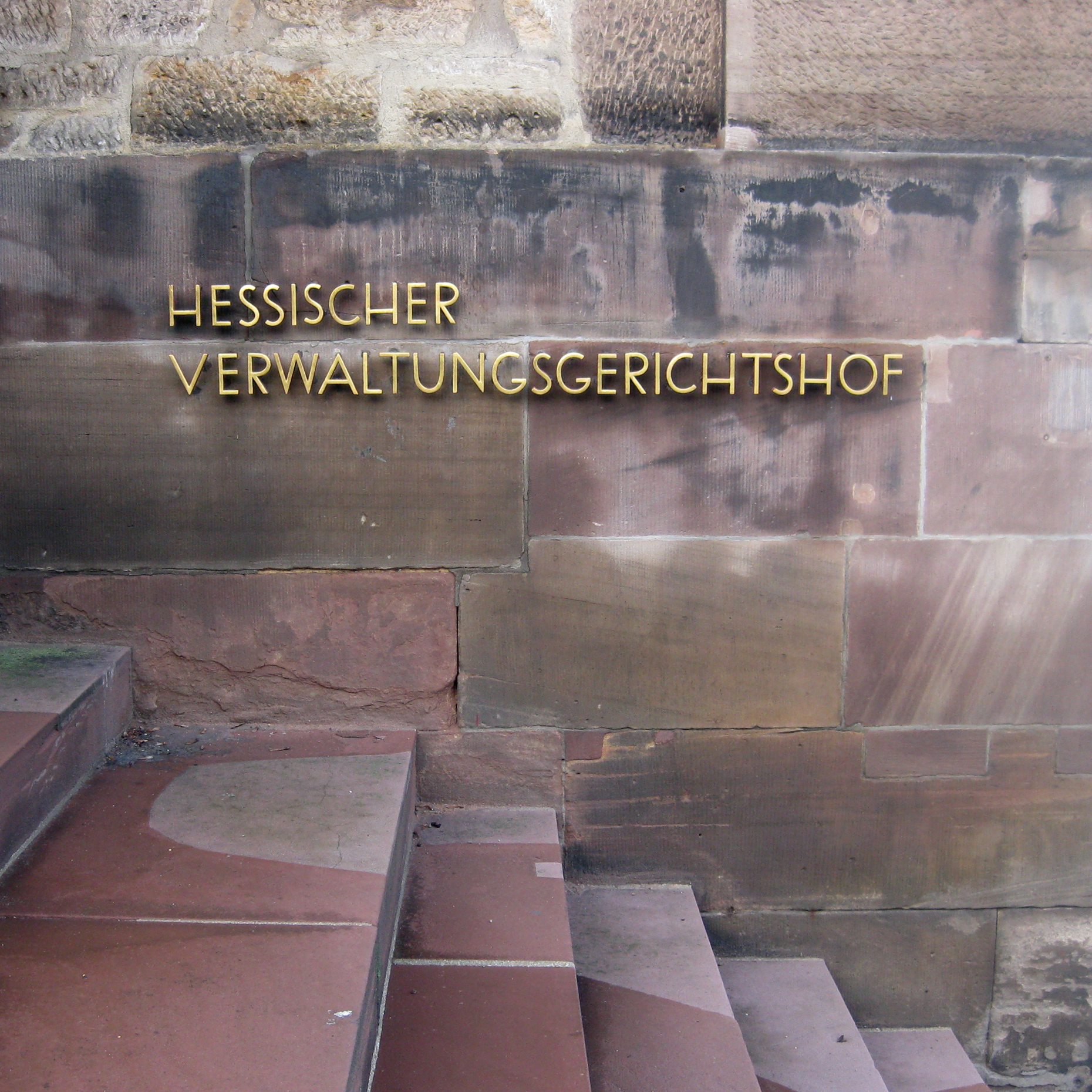 Schriftzug des Hessischen Verwaltungsgerichtshofs am Torhaus